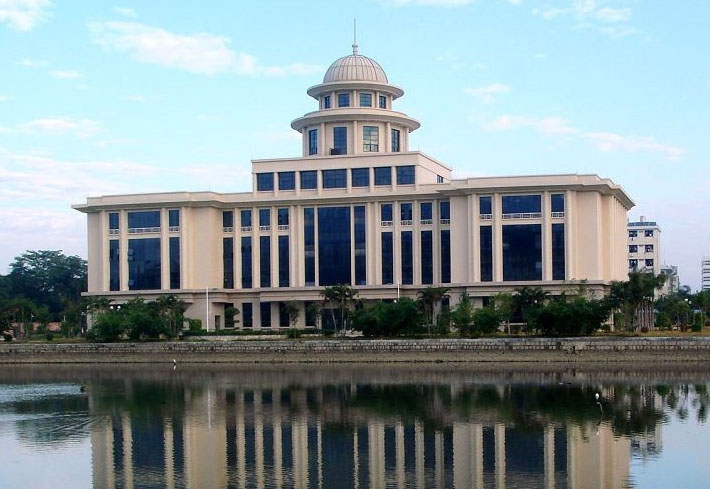 Puning-Zhuang